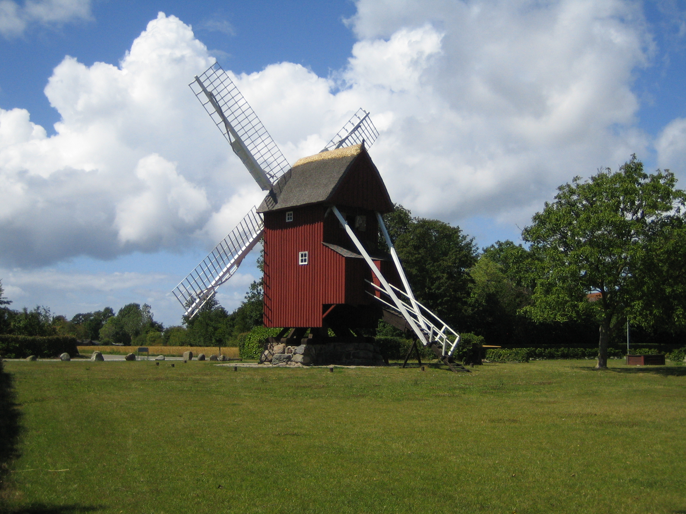 Kappel mølle, foto af Holger Villadsen, som har overdraget rettighederne til mig